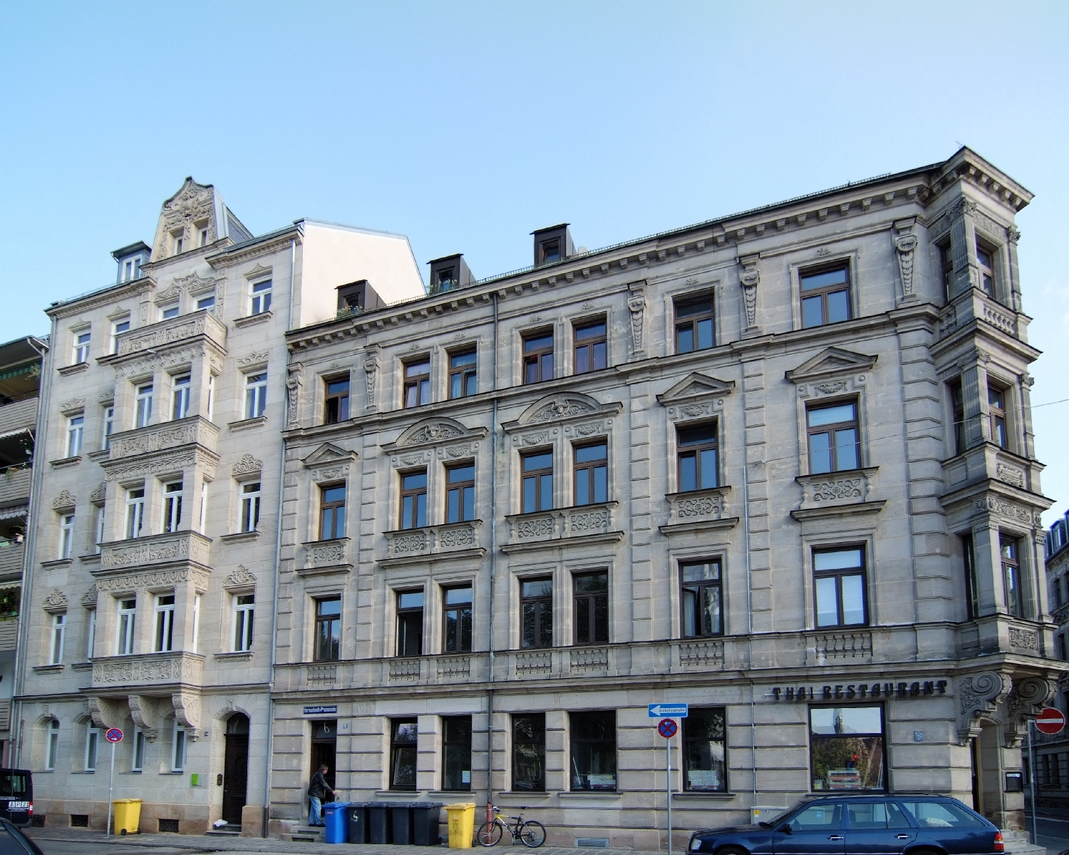 Fürth, Bavaria, Germany